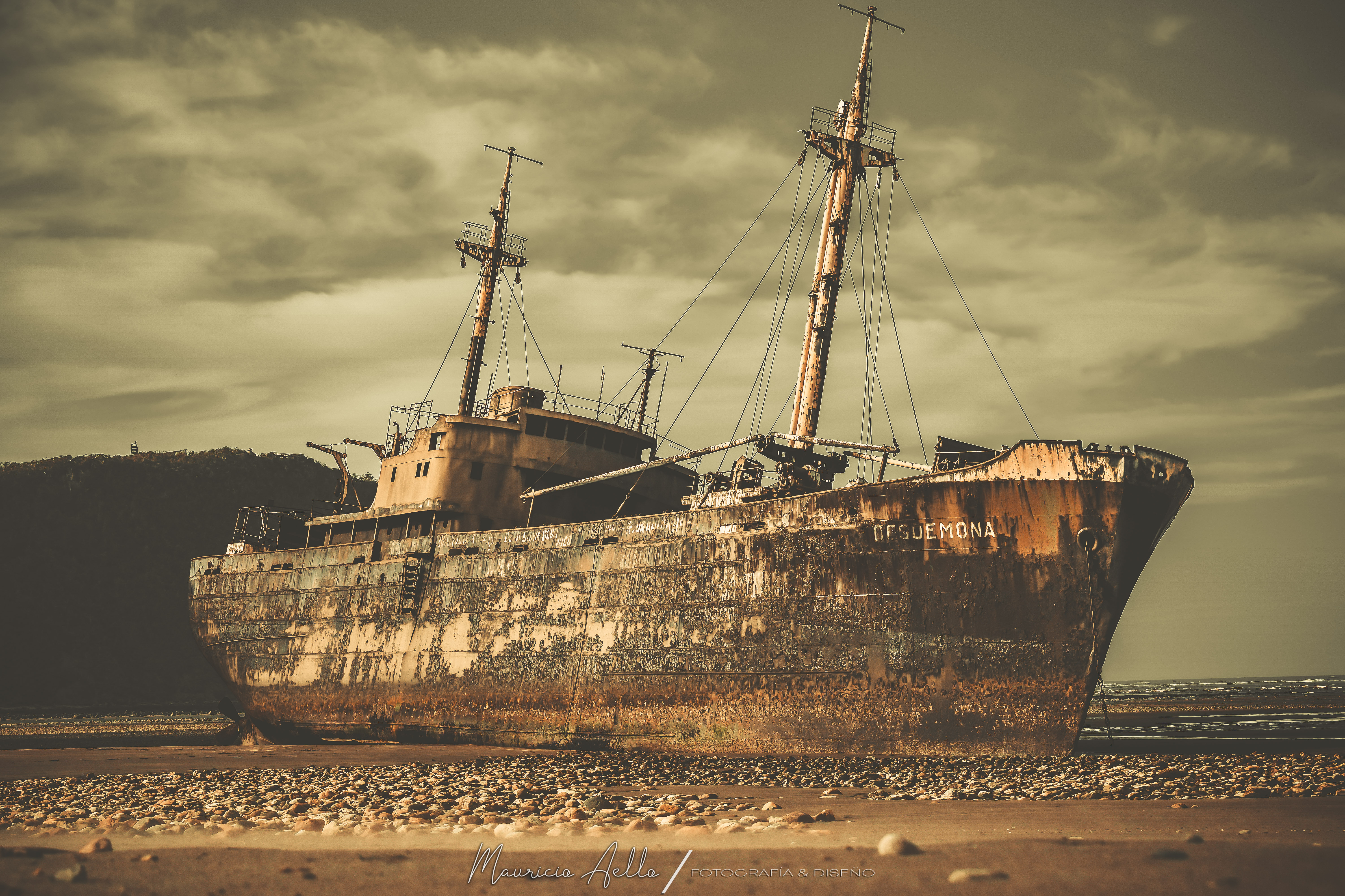 El Barco Desdémona